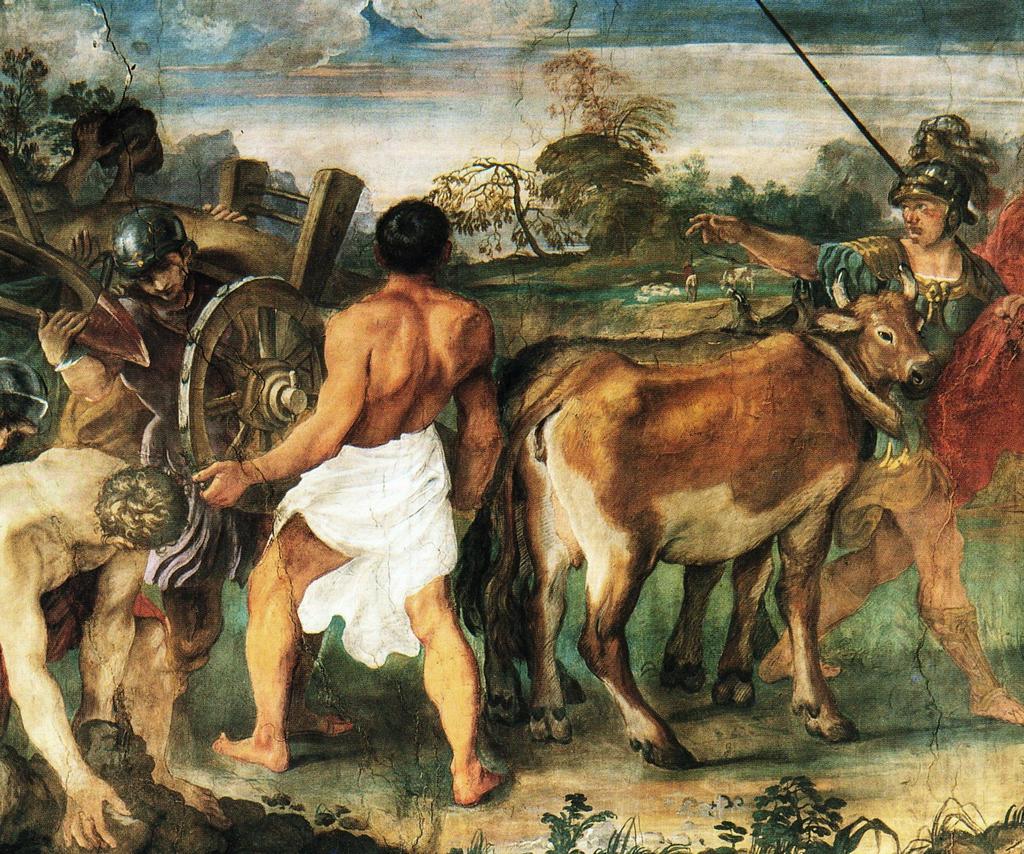 Carracci Annibale, e aiuti Storie della fondazione di Roma - Romolo traccia i confini di Roma Materiali: affresco Collocazione: Palazzo Magnani, Bologna